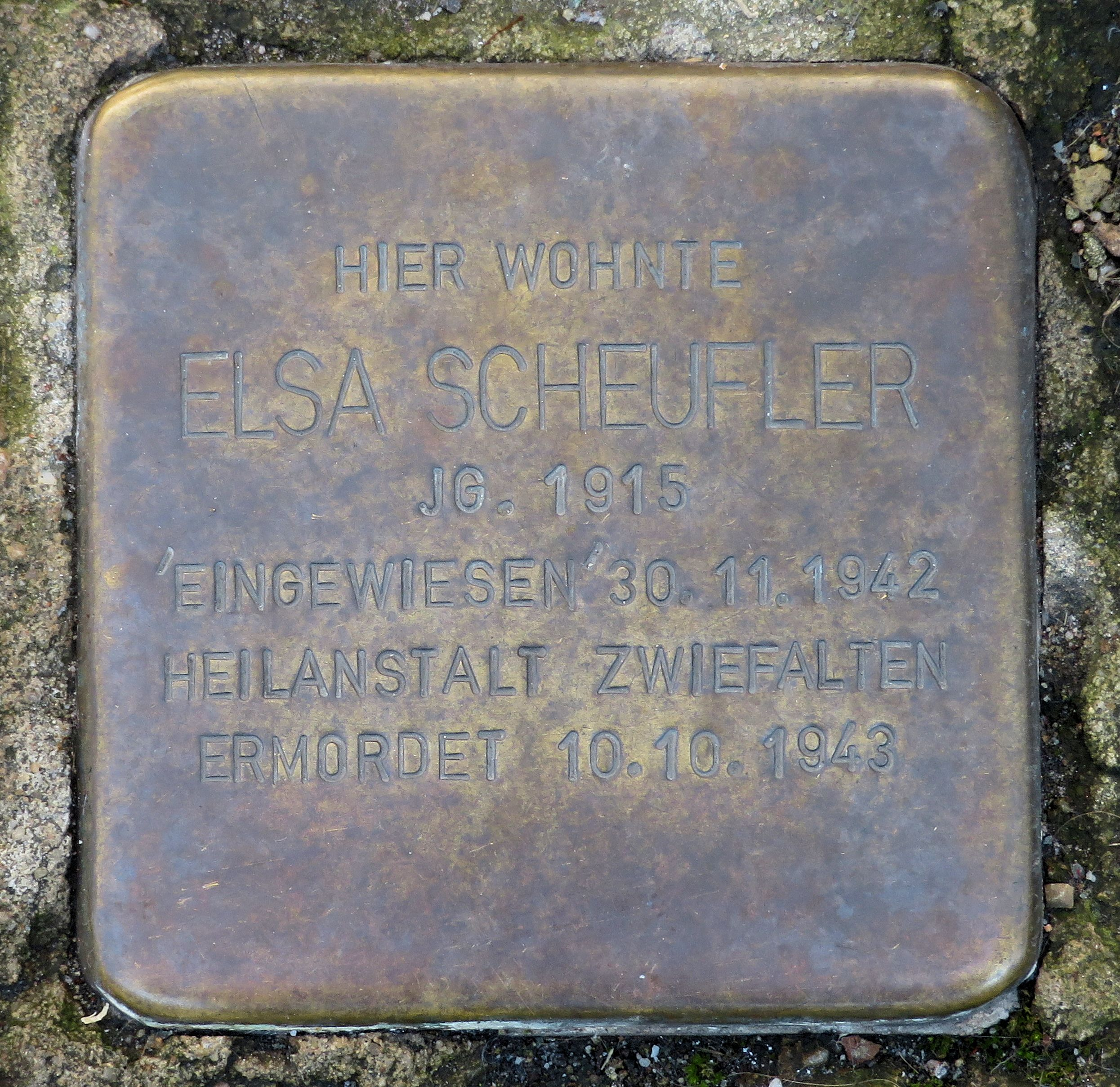 Stolperstein für Elsa Scheufler in Heilbronn